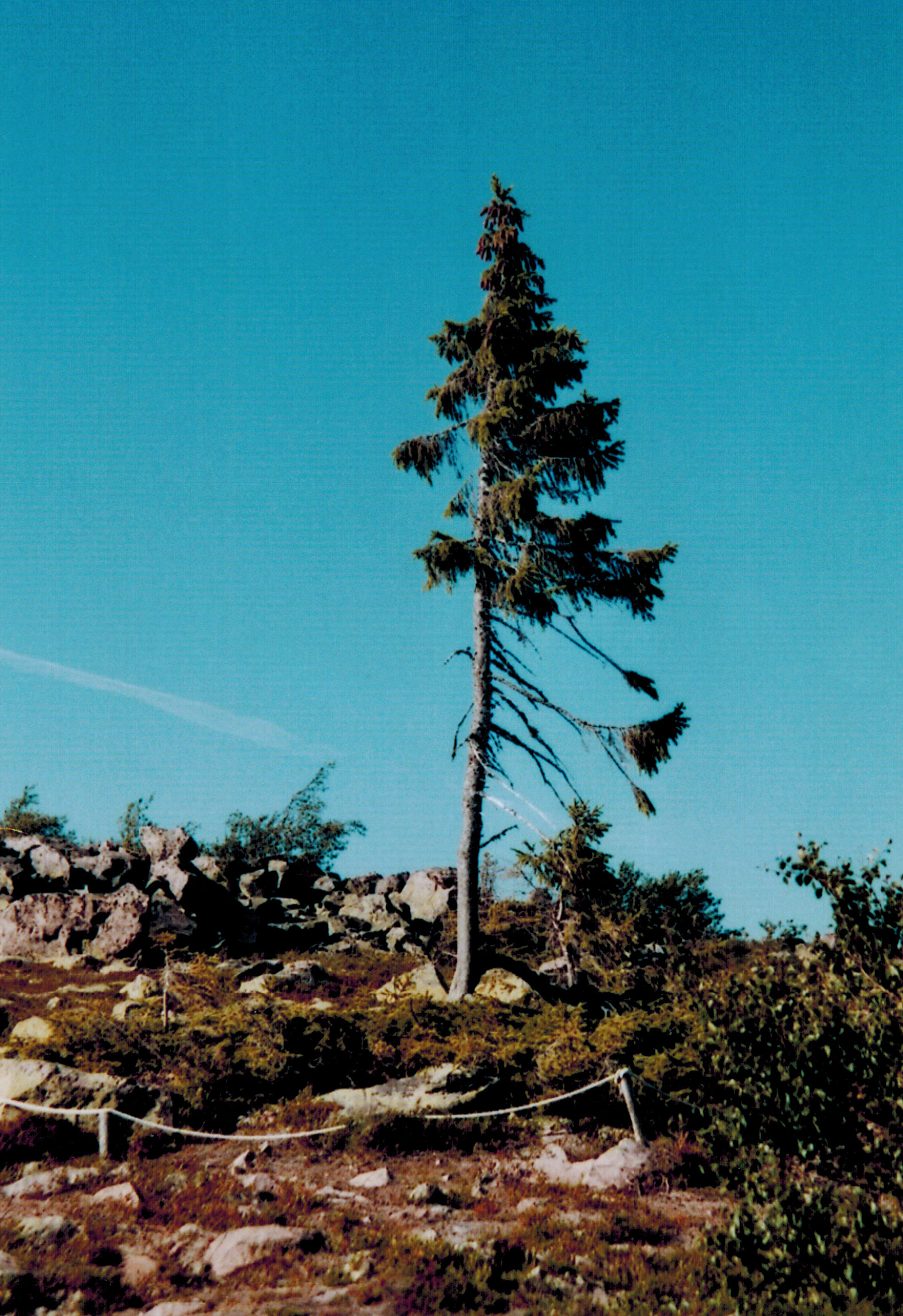 Old Tjikko der älteste Baum der Welt